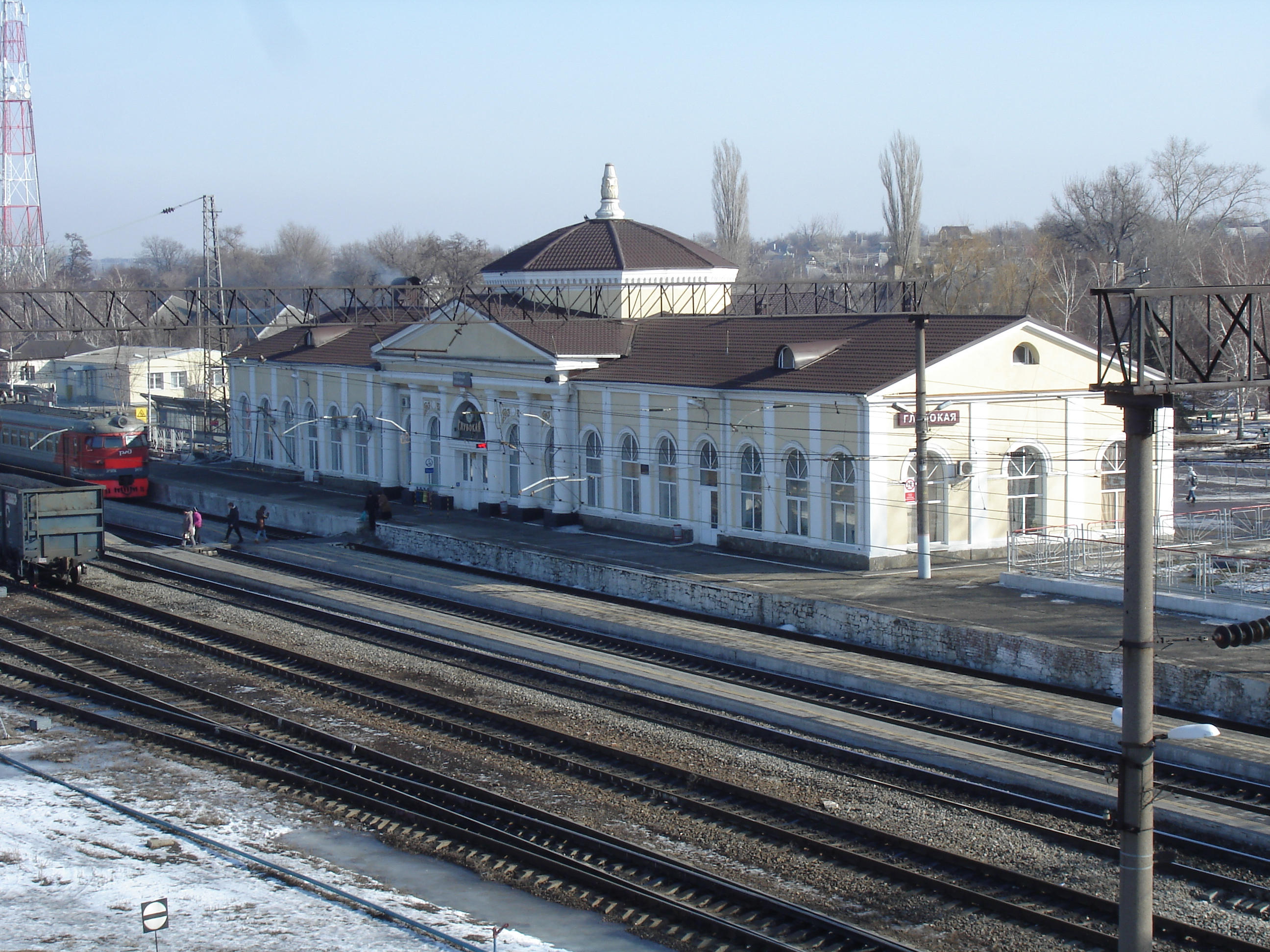 Посёлок Глубокий, Ростовская область - железнодорожный вокзал вид с переходного моста.